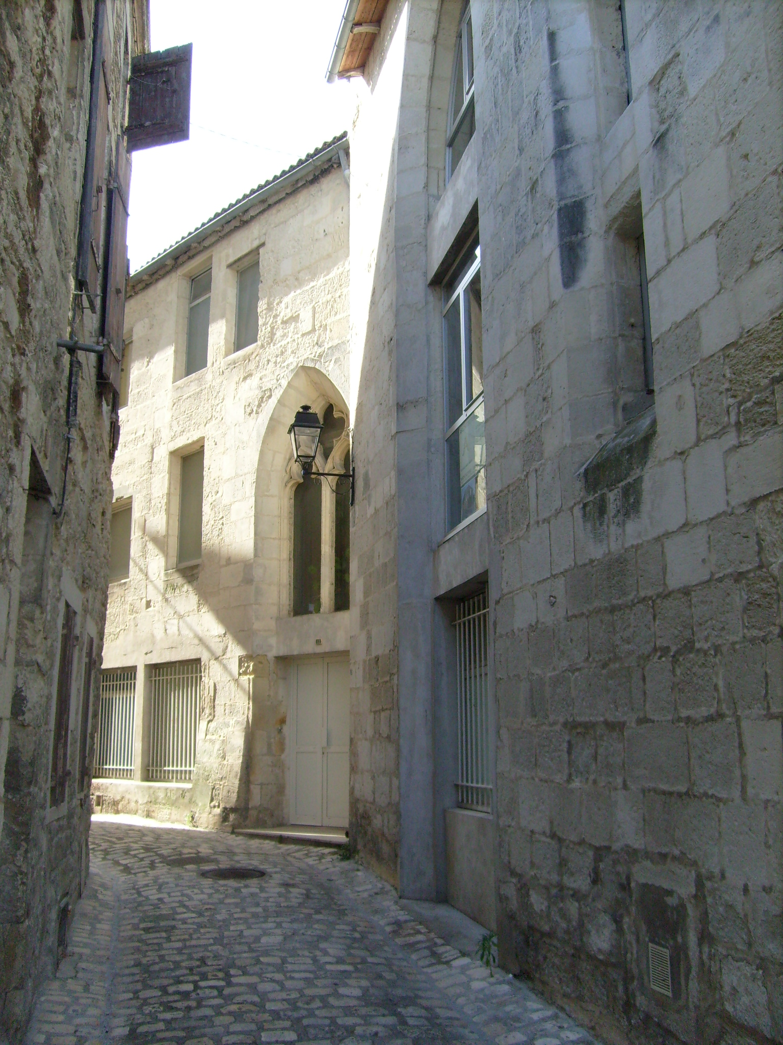 Ruelle du vieux-Saintes